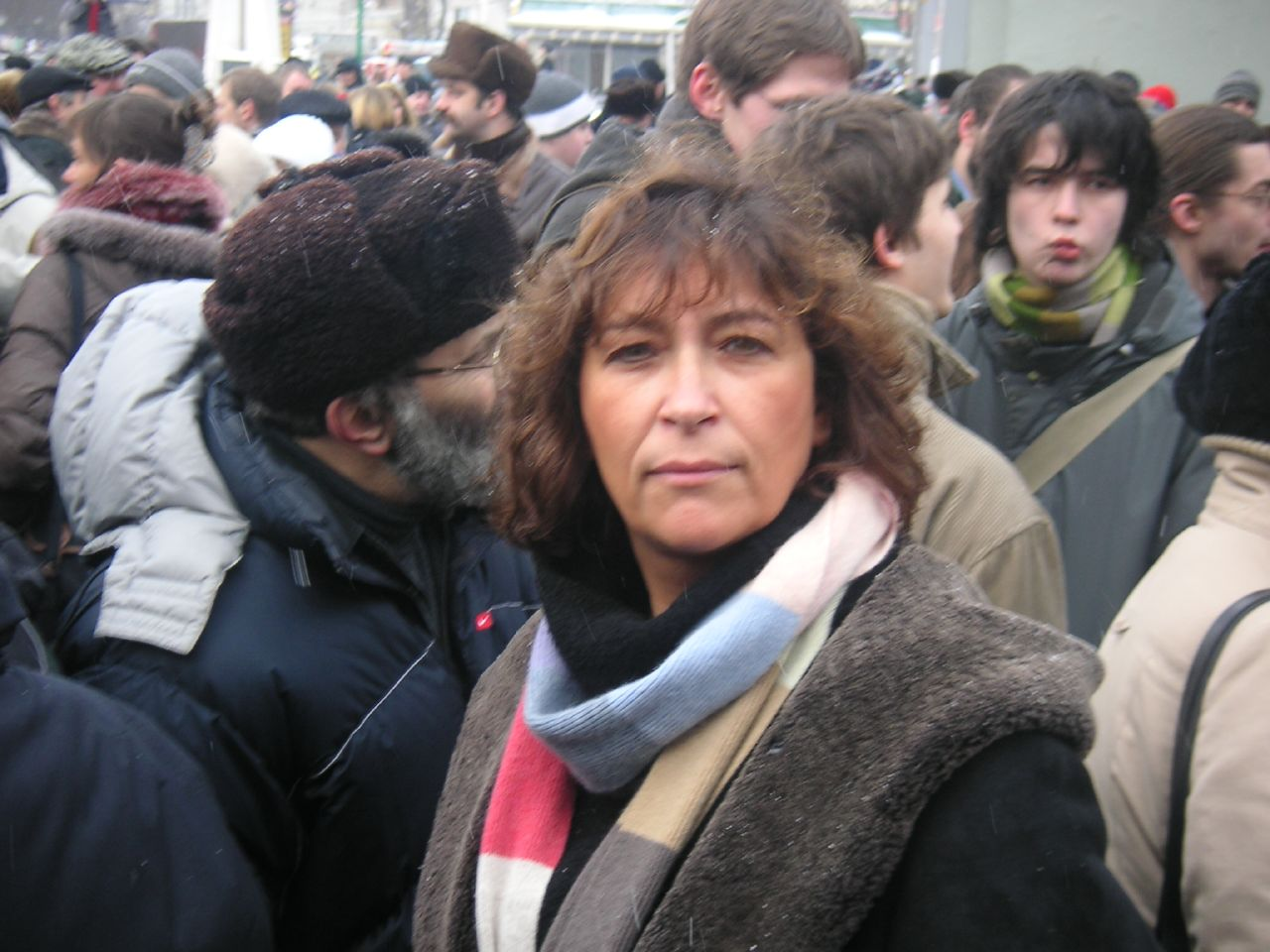 Евгения Марковна Альбац